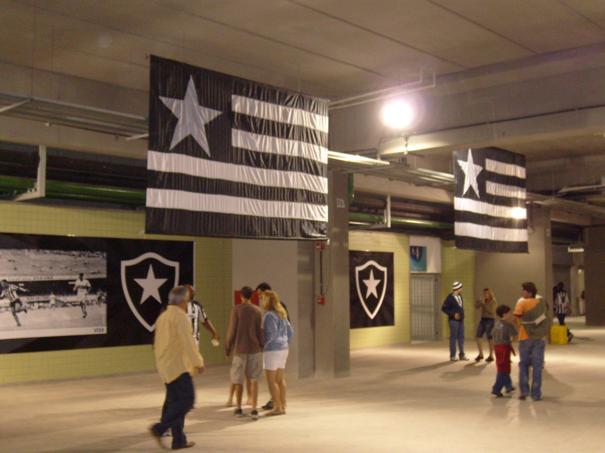 Foto do interior do Setor Vip/Visa Estádio Olímpico João Havelange, o Engenhão.